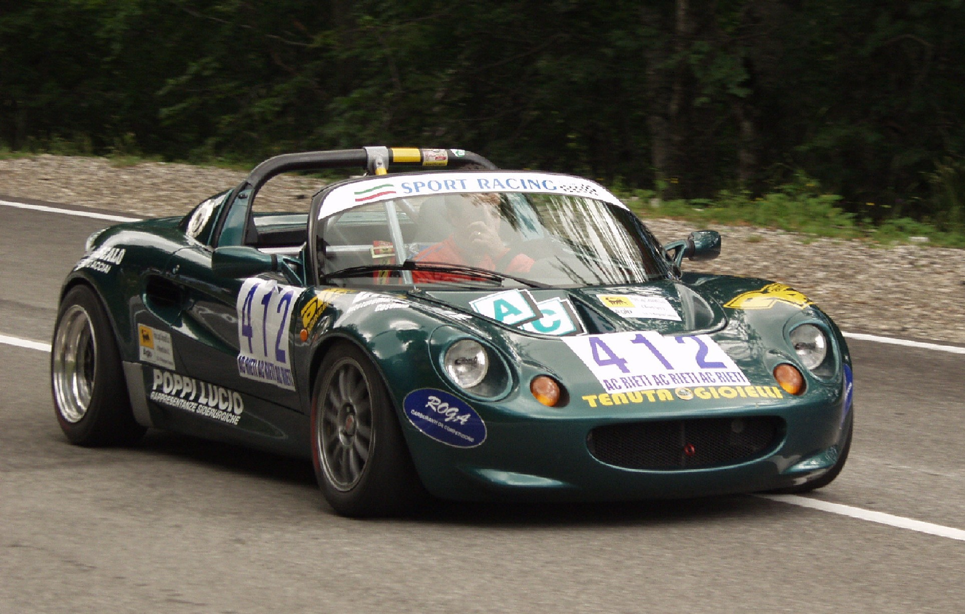 Lotus Elise, foto scattata il 6.7.03 alla Rieti-Terminillo (Coppa Carotti)